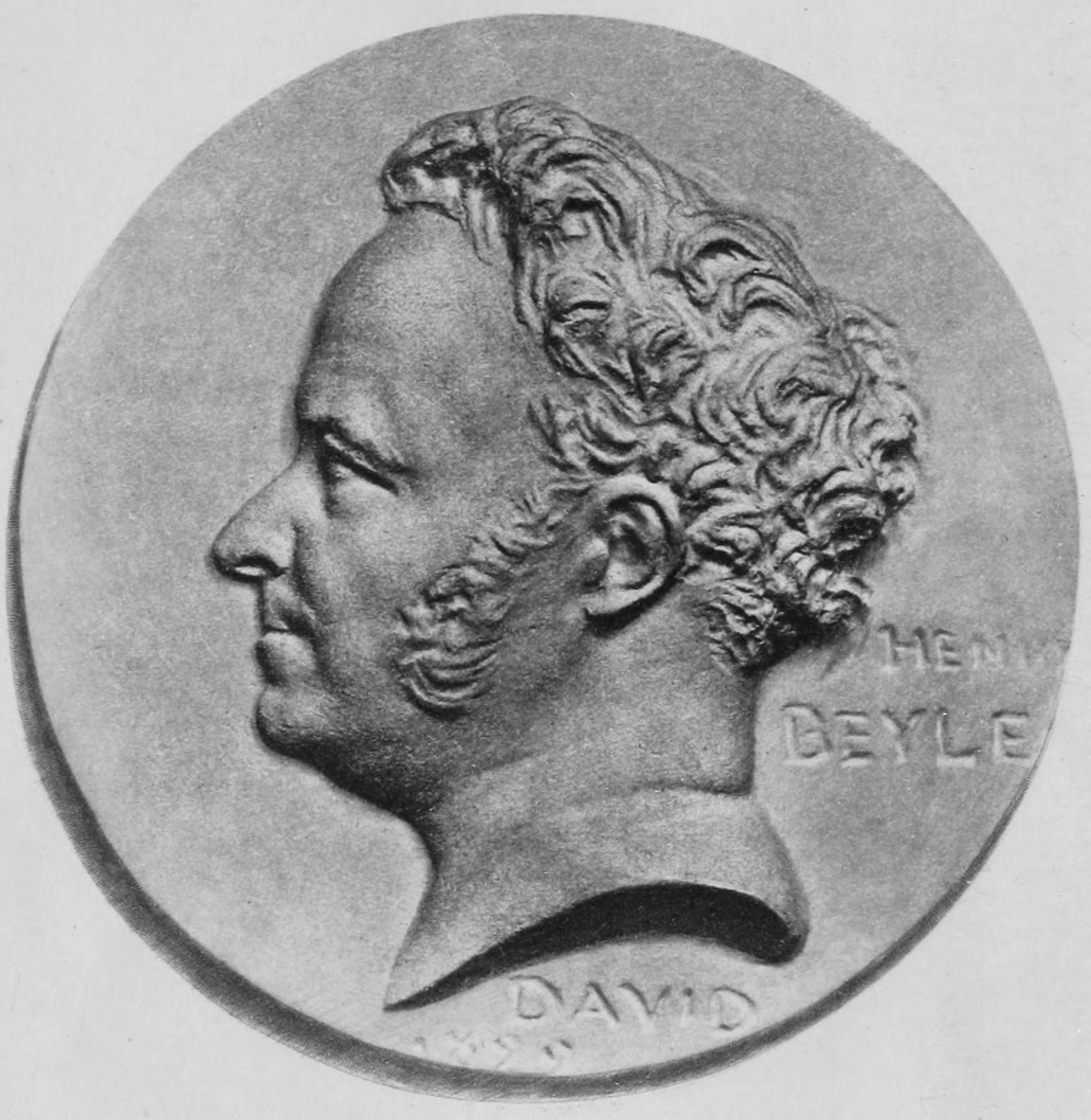 Profil gauche de Stendhal. Réduction du médaillon de David d’Angers.